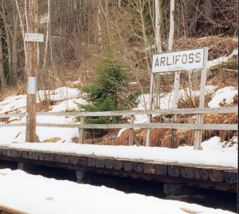 Årlifoss på Tinnosbanen, Telemark.